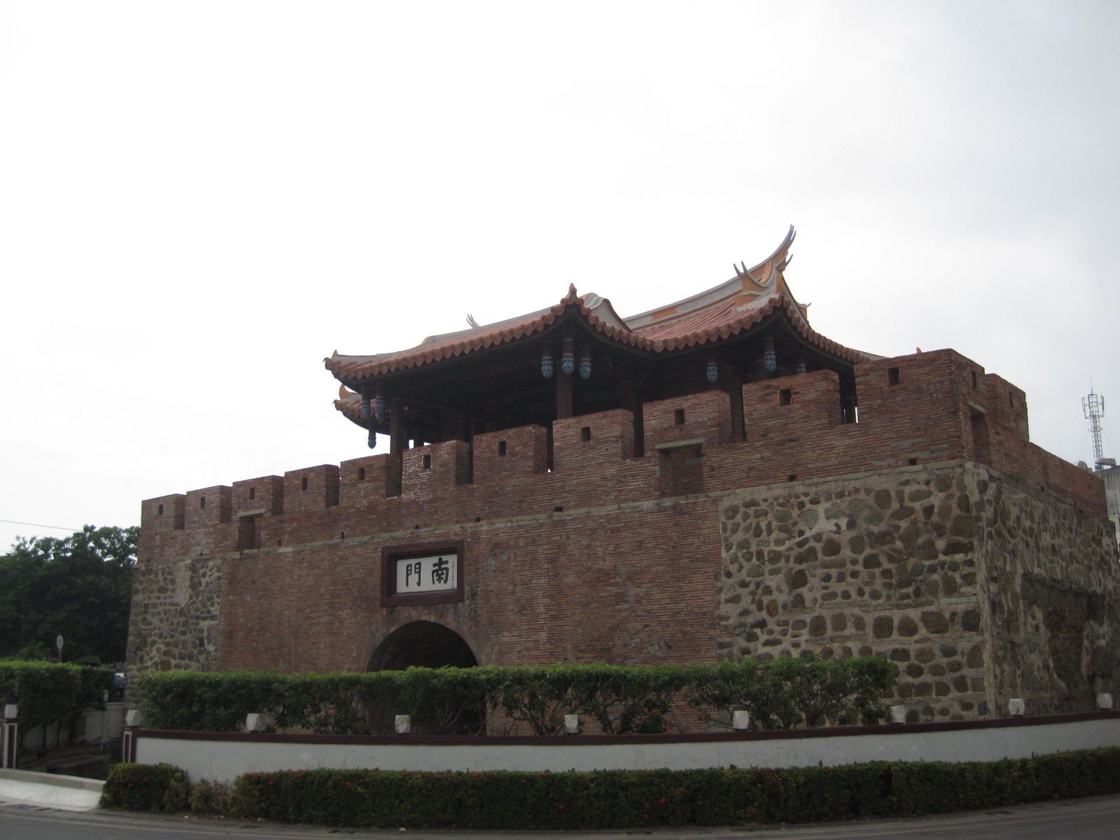 恆春縣城南門